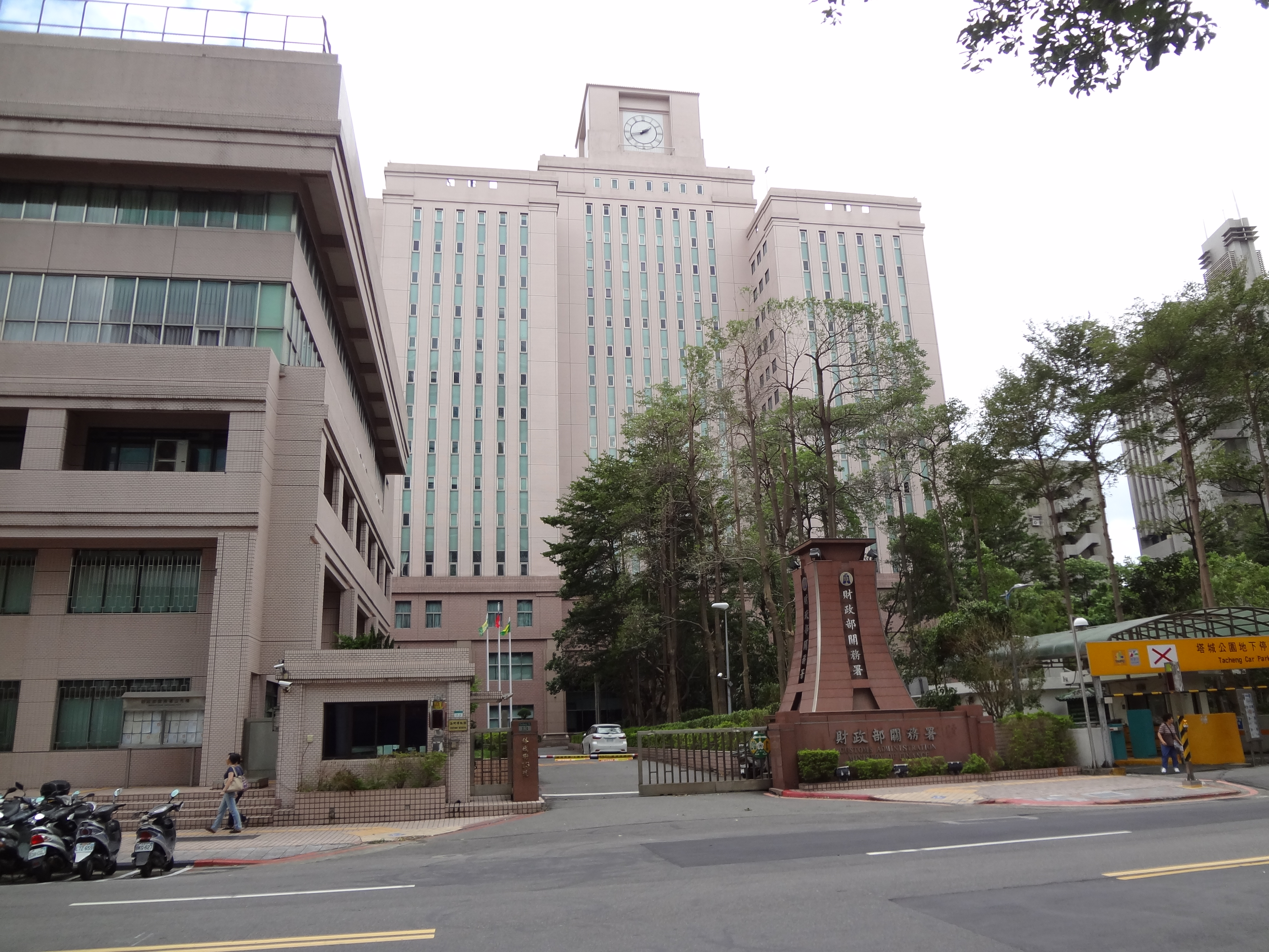 中華民國財政部關務署，位於臺北市大同區塔城街13號。